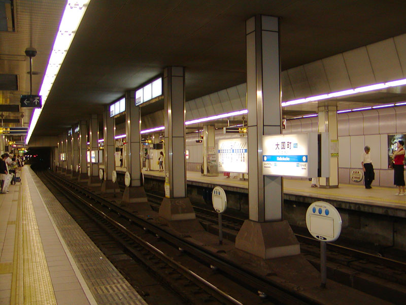 大阪市営地下鉄御堂筋線・四つ橋線 大国町駅ホーム。